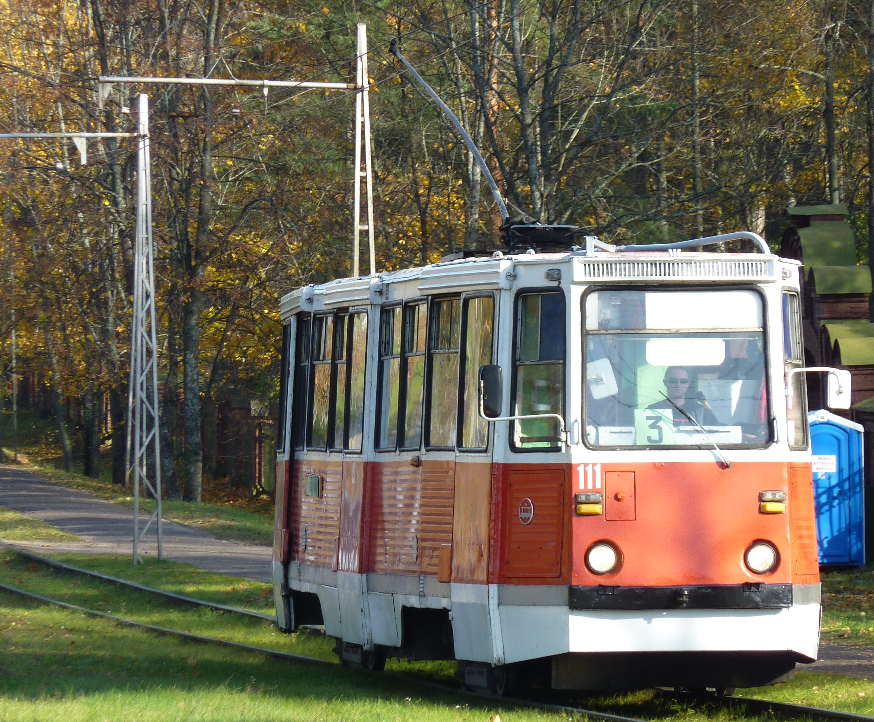 Tramwaj linii 3 w Dyneburgu jadący wzdłuż ulicy 18 listopada